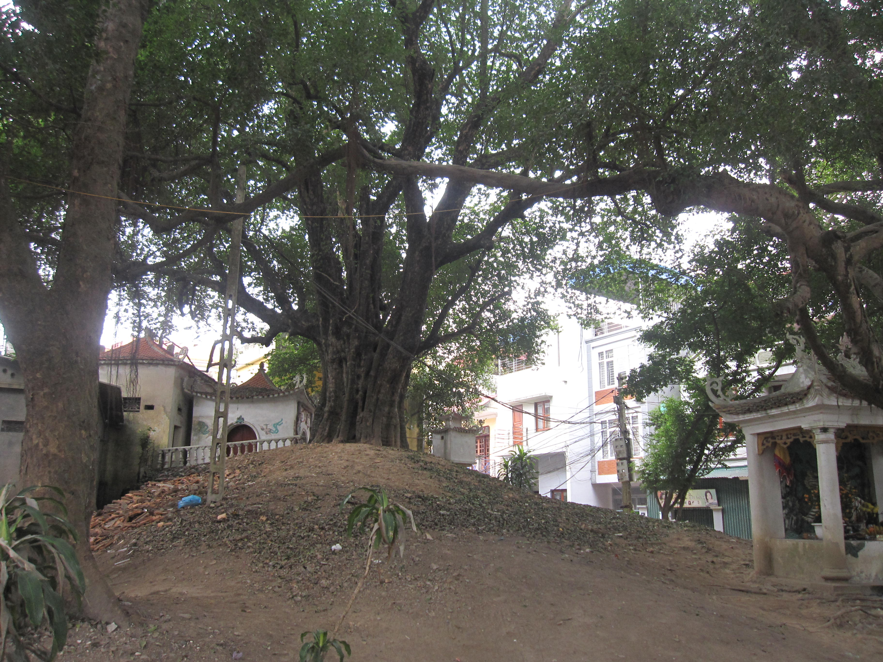 Gò Thất Diệu ở làng Quán La Xã, phường Xuân La, quận Tây Hồ, Hà Nội, Việt Nam